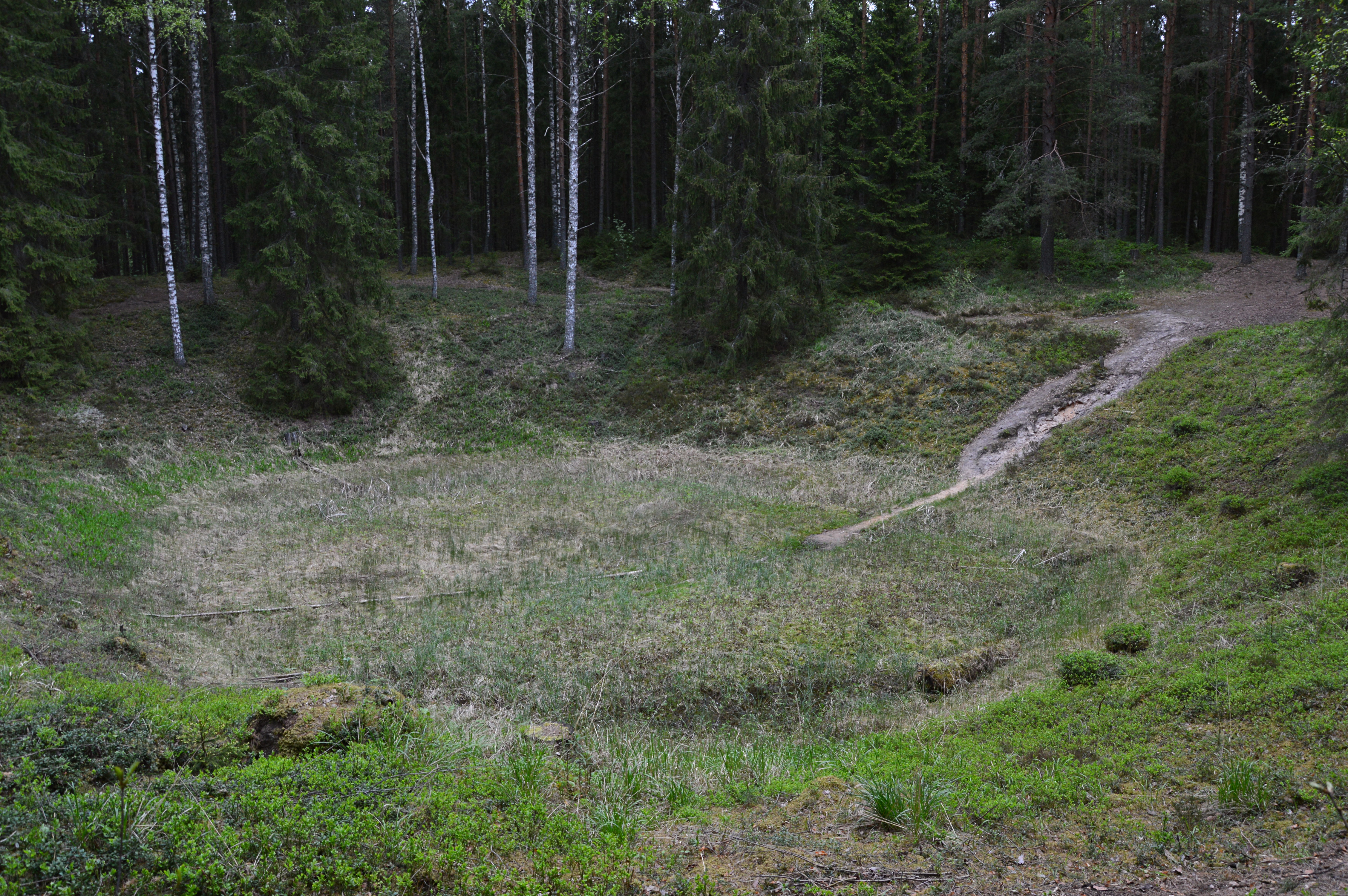 Põrguhaud. Meteoriidikraater.